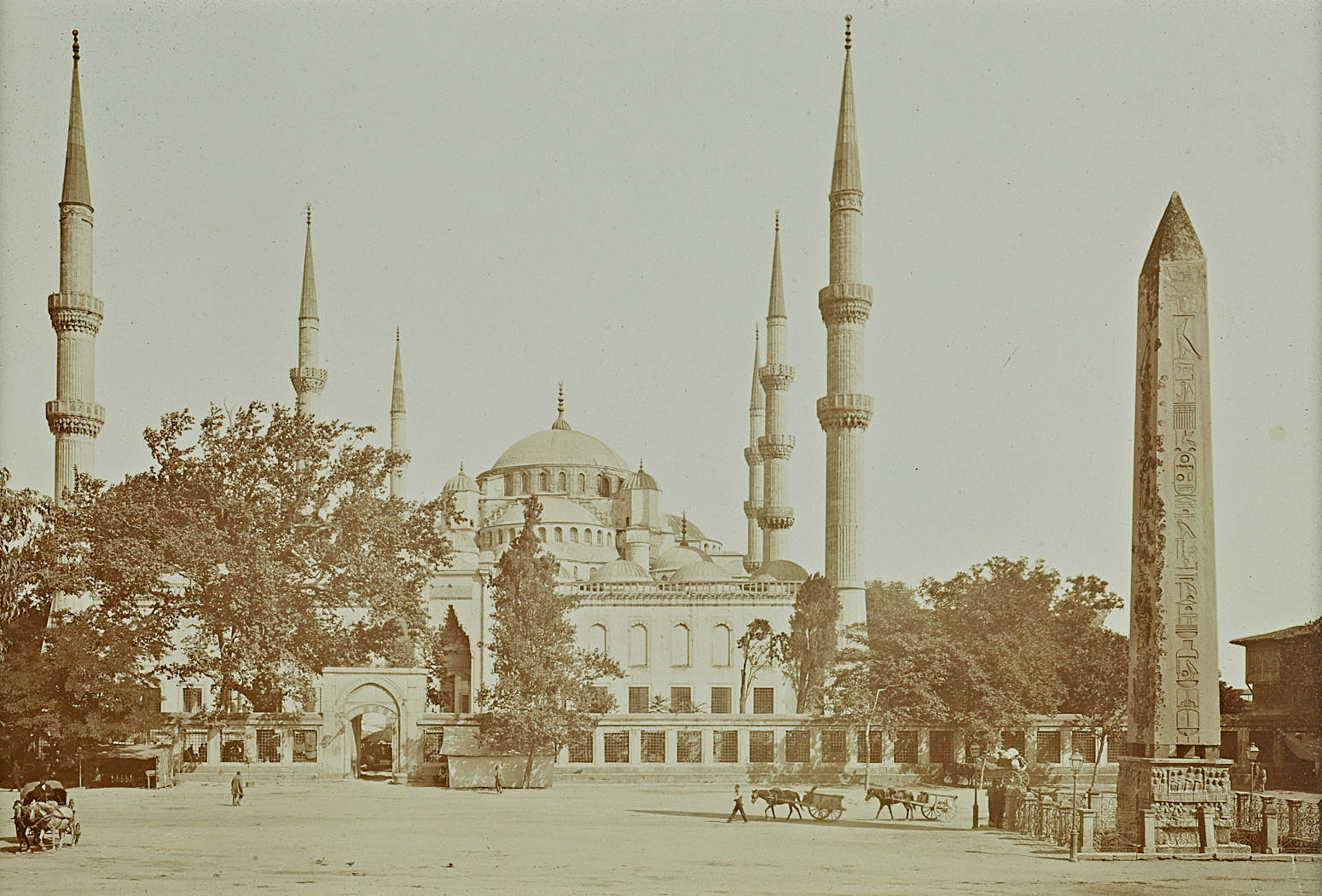 Sultanahmet Camii ve Dikilitaş